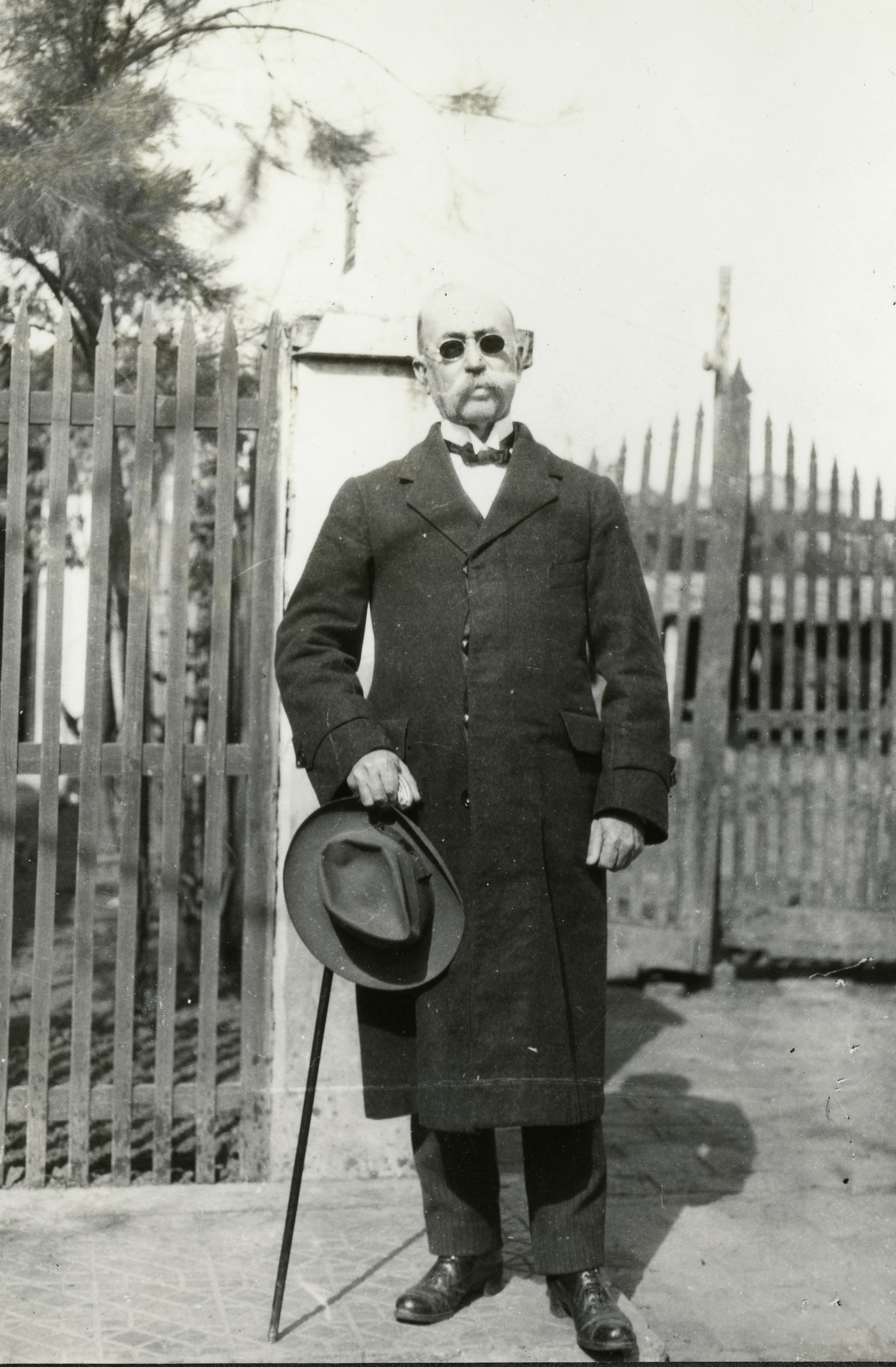 Enrique Lynch Arribálzaga (1856 - 28 June 1935)